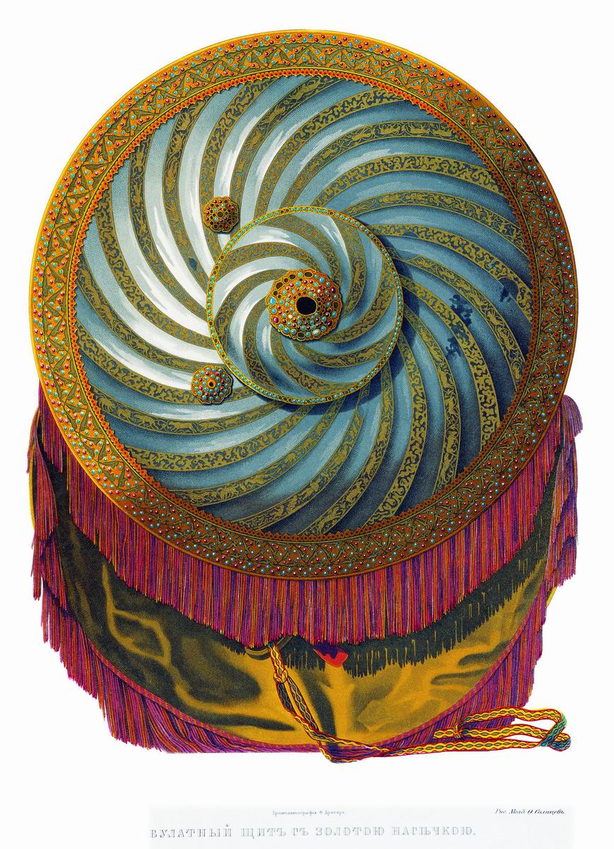 «Щит булат красной, грани круглые, через грань врезывано золото травы и звери; а в них шесть репьев золотых сканных с каменьем и в трех репьях нет трех каменьев; подвершье с яблочком золотое сканное, венец золот сканной, поверх венца золота венец железной золочен травы чеадайские на обрез, земля канфарена; окола щита бахрама шолк червчат с серебром; с исподи прикрепка серебром кованым белым с гвоздми серебреными золочены горощатыми; две пряжи золотые гладкие привязошные с цветками; подложен, подушечка отлас серебрен; а на нем по сторонам четыре клейма Немецких; у подушки привяска оболочена бархатом червчетым на кольцах медных; в подвершьях и в яблоке, и в репьях, и в венце тысеча четыре ста сорок восемь искорок мелких лаликов и винисок, и бирюз, да тридцать два зернышка жемчужных. А по нынешней переписи рч`є года и по осмотру, тот щит против прежних переписных книг сшолся, четырех репьев, да яблока золотых с каменьи, да двух пряжек золотых нет, в репьях и в венце и в поясу многих камешков нет, в венце вверху золото обломлено, опушки серебреные больши половины нет, бахрама попорчена; цена тому щиту по оценке стволнаго дела мастера Афанасья Вяткина с товарищи тысеча рублев, а в прежней описной книге написан первым же».